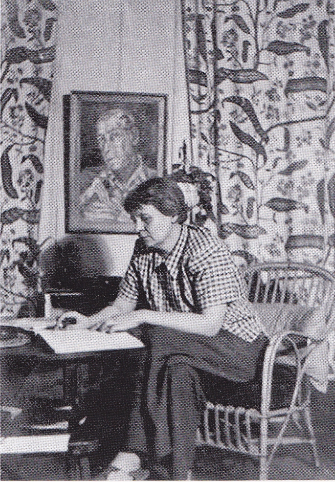 In New York in den frühen 1940-er Jahren gemalt